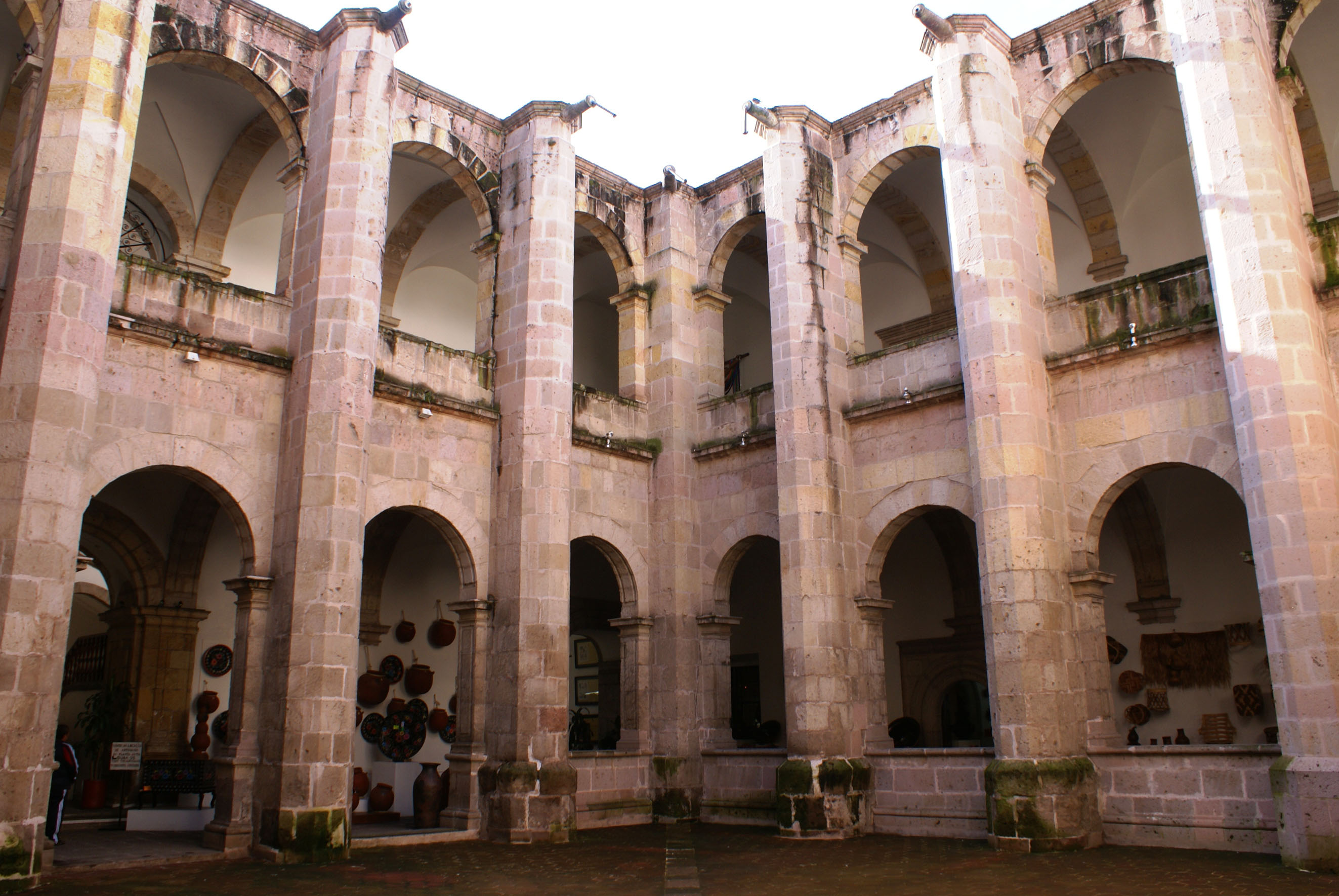 Casa de las Artesanías de Michoacán, recinto cultural público ubicado en la ciudad de Morelia, Michoacán, México; enfocado en la conservación y difusión del arte popular de las distintas regiones del estado, tiene su sede en un ex convento del siglo XVI.